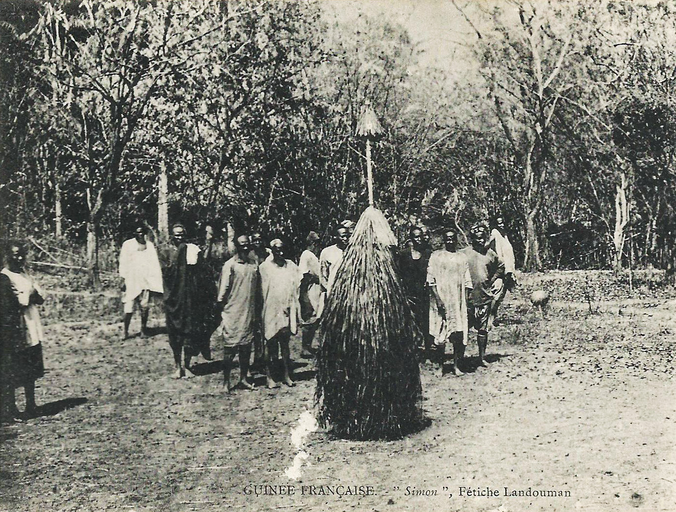 "Simon", fétiche Landouman. Guinée française pas de mention d'auteur, d'éditeur ou de date